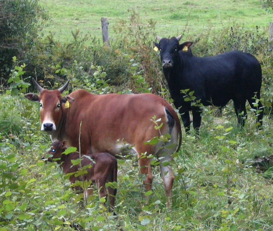 Zwergzebu im Mittelgebirge (Hunsrück)